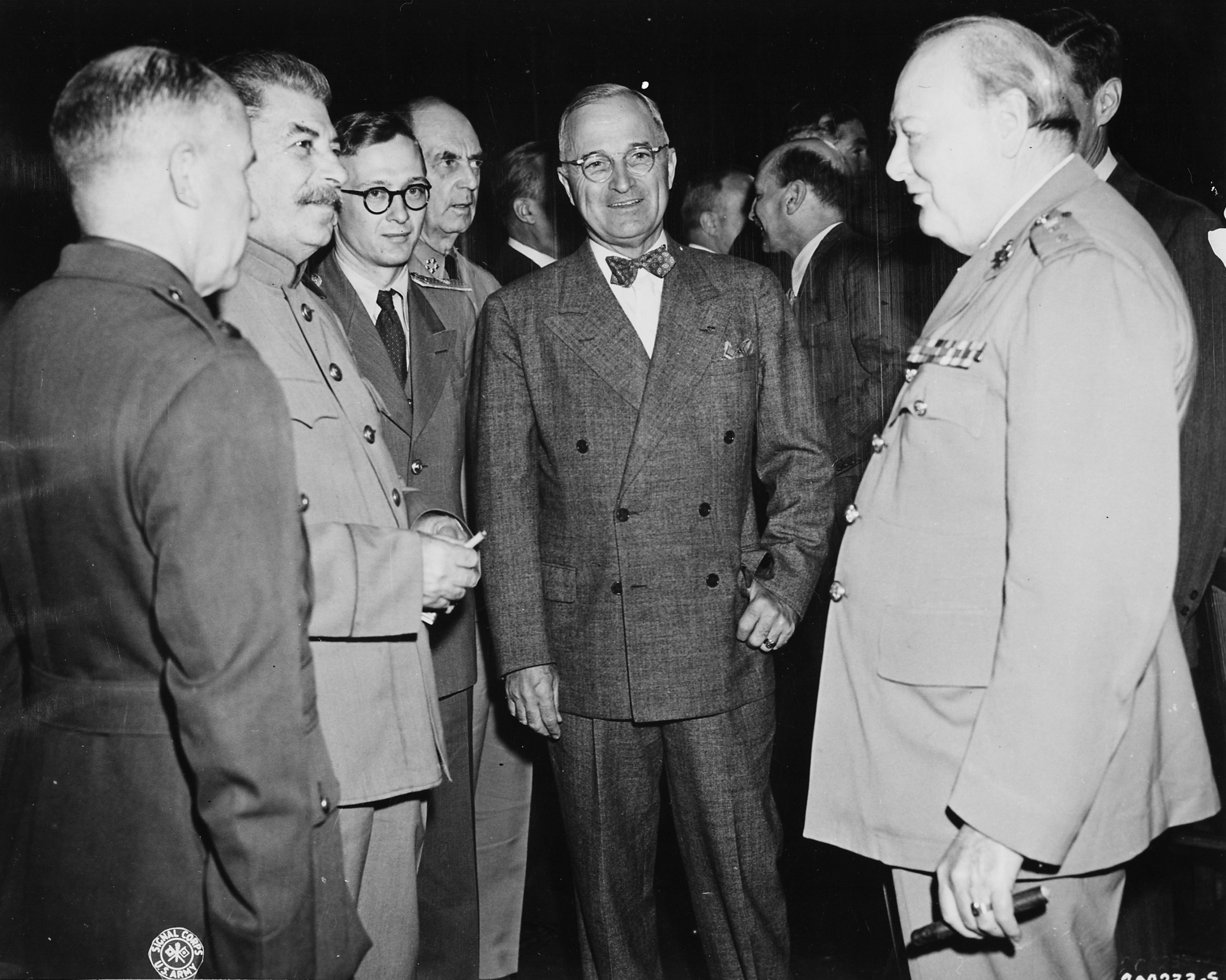 Potsdamer Konferenz, Stalin, Truman, Churchill Zentralbild Potsdamer (Berliner) Konferenz der führenden Staatsmänner der drei alliierten Mächte der UdSSR, Grossbritannien und der USA vom 17. Juli bis 2. August 1945 in Schloß Cecilienhof und Babelsberg. Ihr Ergebnis ist das Potsdamer Abkommen, das die völkerrechtlichen Grundfragen für den Aufbau eines friedlichen, demokratischen deutschen Staates und die Politik der Siegermächte gegenüber Deutschland festlegt. Unser Bild wurde während einer Konferenzpause in Potsdam gemacht und zeigt v.l.n.r.: Stalin, Truman und Churchill [Josef Stalin, Harry S. Truman, Winston Churchill] Abgebildete Personen: Churchill, Winston: Premierminister, Großbritannien (PND 118520776) Truman, Harry S.: Präsident, Demokratische Partei, USA (PND 118624210} Stalin, Josef W.: 1878-1953; Marschall, Vorsitzender des Ministerrates, Generalsekretär der KP, Sowjetunion (PND 118642499)